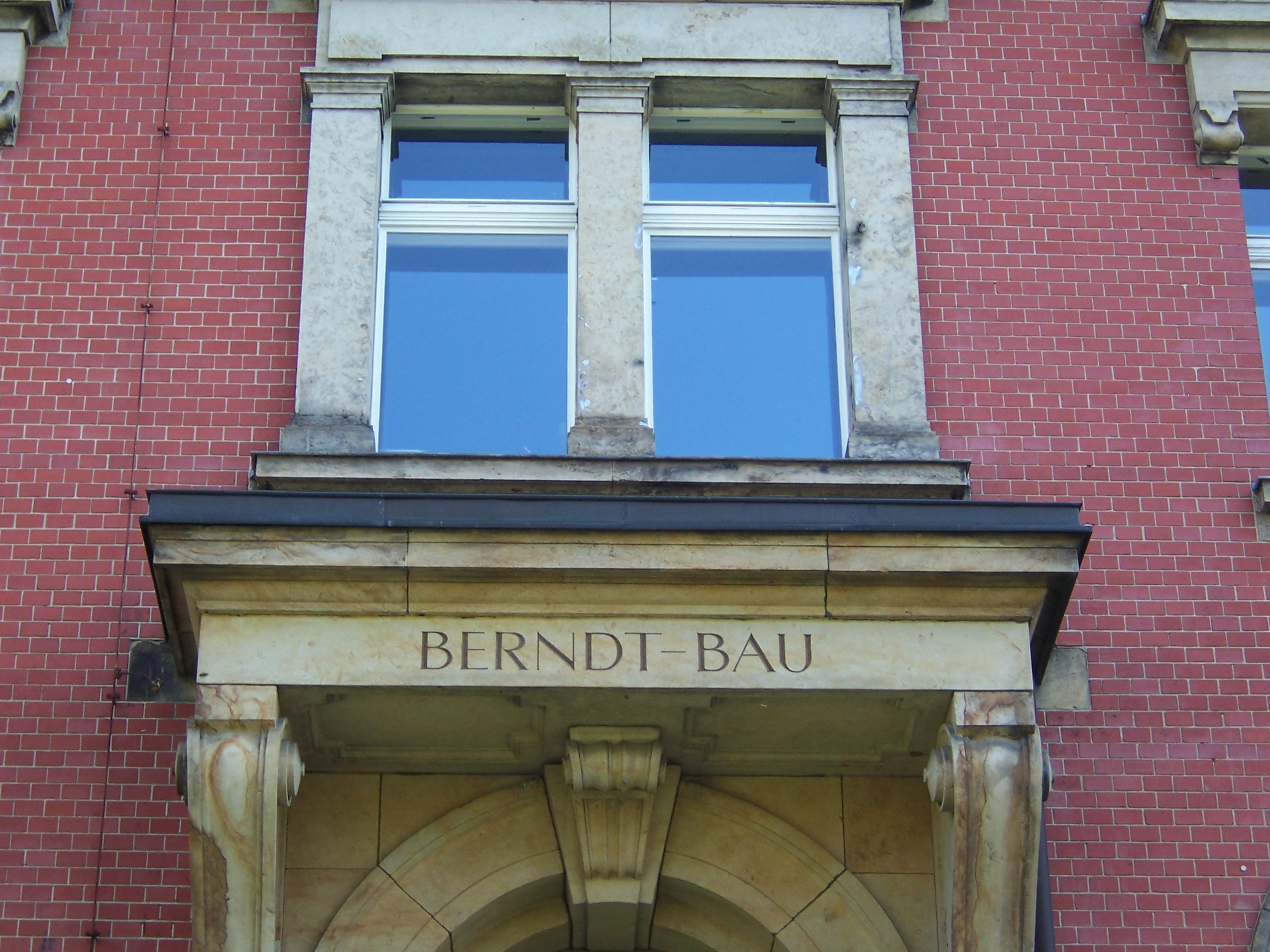 Berndt-Bau, Technische Universität Dresden